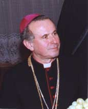 PCC Bishop Wiktor Wysoczanski Biskup Kościoła Polskokatolickiego prof. dr hab. Wiktor Wysoczański